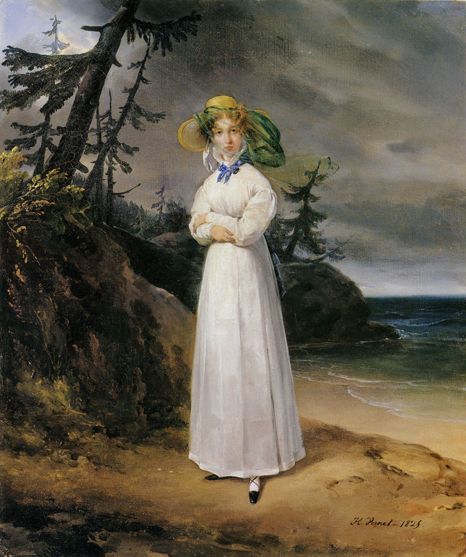 Comtesse Jean-Henri Louis Greffulhe